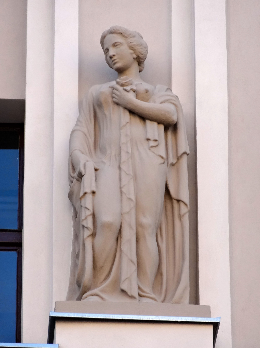 Dom Towarowy Jedynak, ul. Gdańska 15 w Bydgoszczy (zbud. 1910)